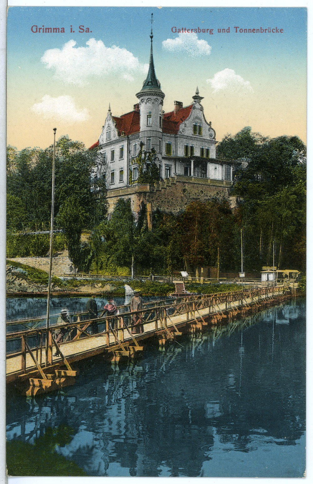 Grimma; Gattersburg und Tonnenbrücke This postcard is from publisher Brück & Sohn in Meißen ( This postcard has a unique number 15179 and is available in a higher resolution at the publisher. This images was uploaded in a cooperation project between Wikipedians and the publisher.